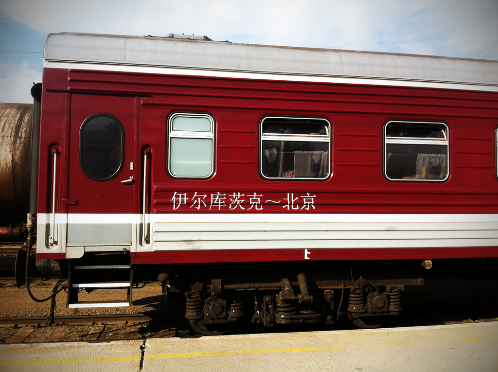 K19/20次列车中的伊尔库茨克车厢